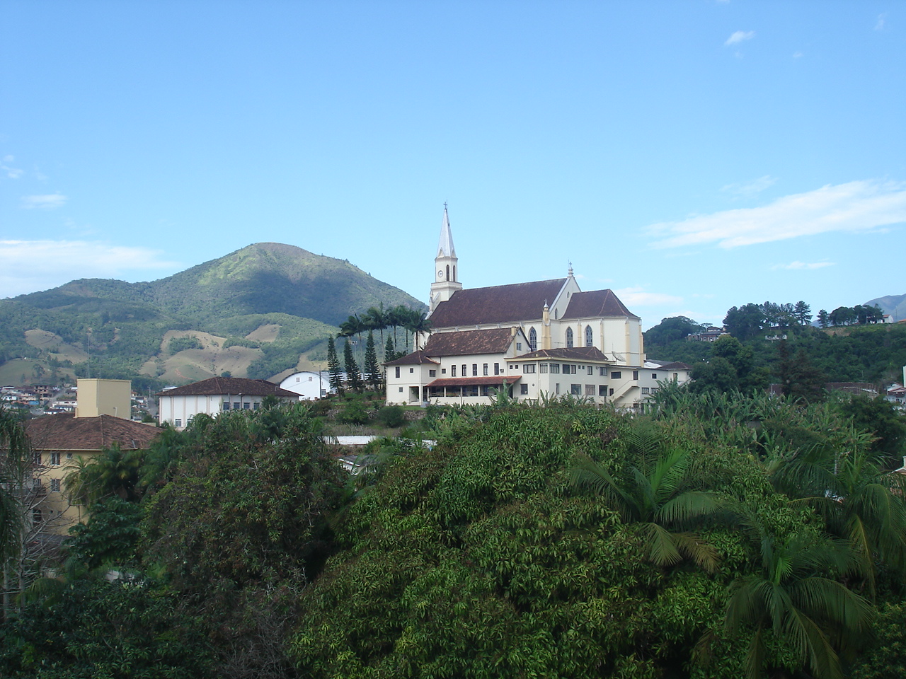 Sto Amaro